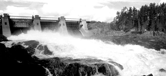 Lanforsens kraftverk i Uppland